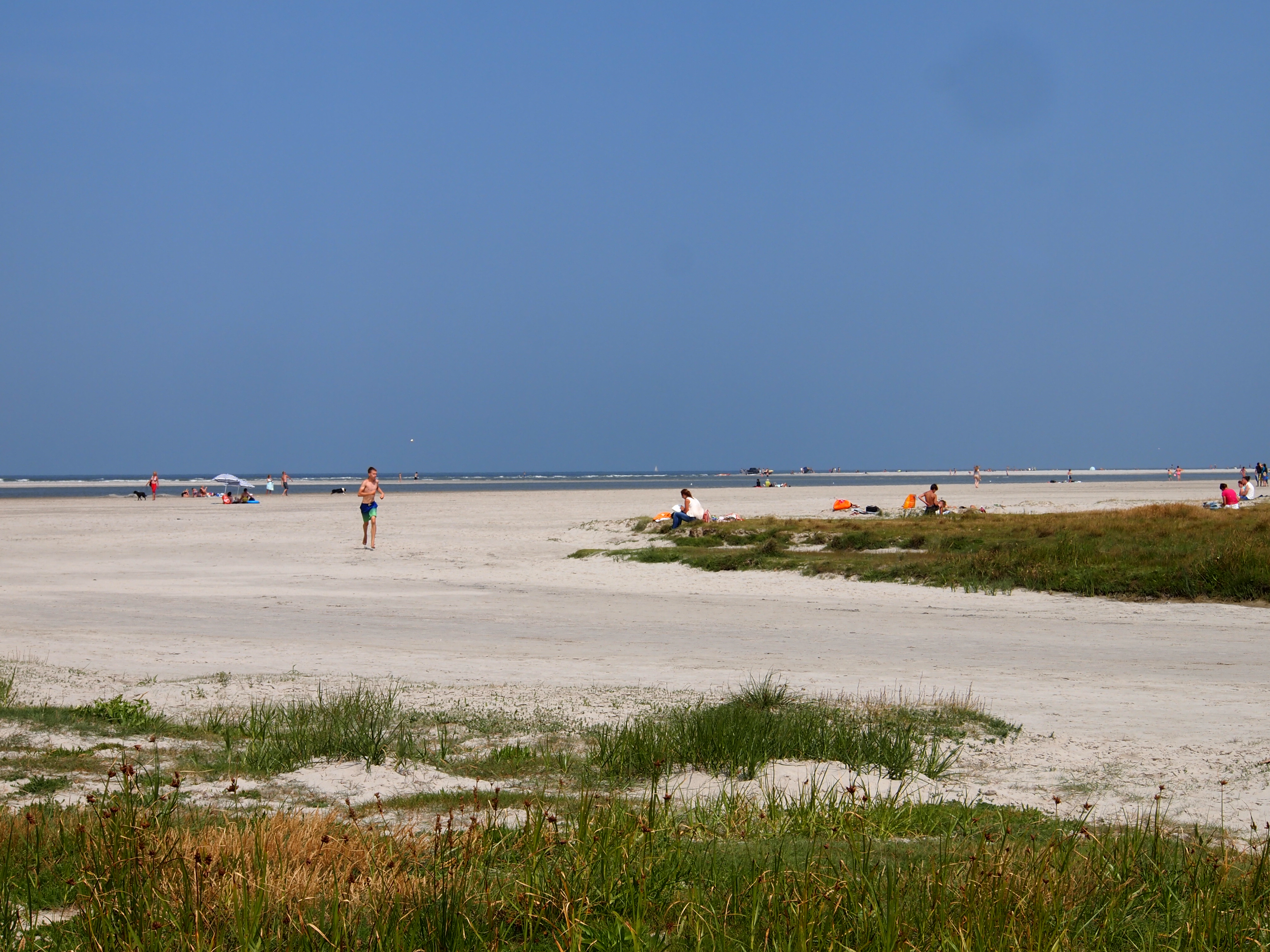 Het brede strand van Schiermonnikoog